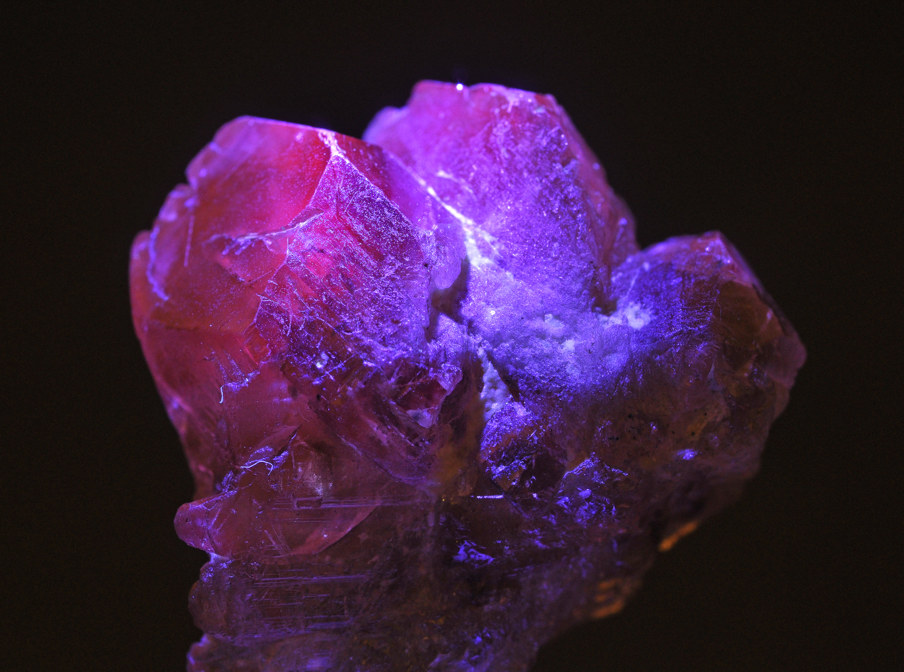 Cristal de chrysobéryl sous rayonnement UV